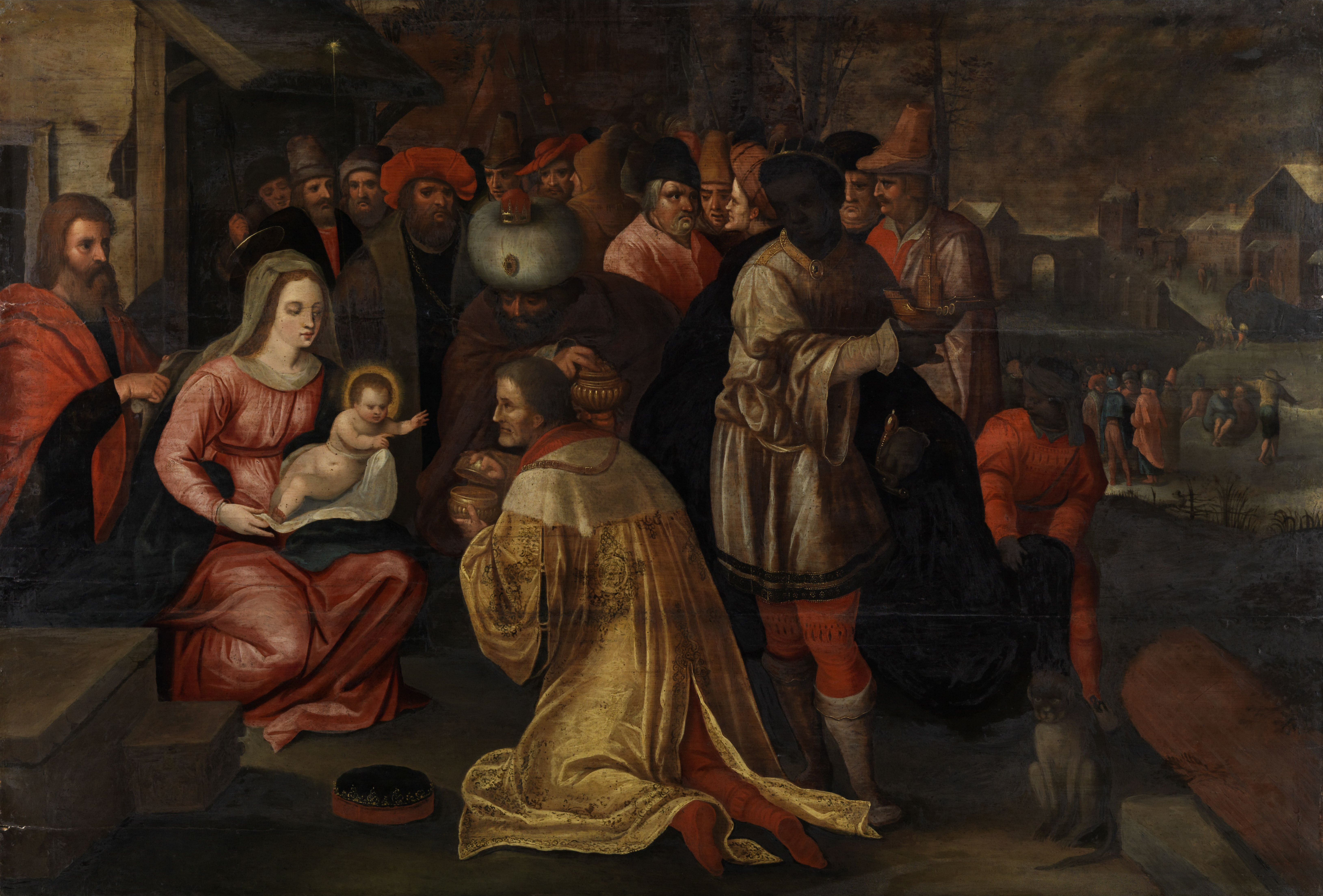 Die heiligen drei Könige in Anbetung des Kindes. Öl auf Leinwand. 75,8 x 106,5 cm. (Zuweisung an den Künstler durch Dr. Ursula Härting; weitere ähnliche Ausführung traditionell Frans Francken II. zugewiesen, von Härting ebenfalls v. d. Hoecke zugewiesen)